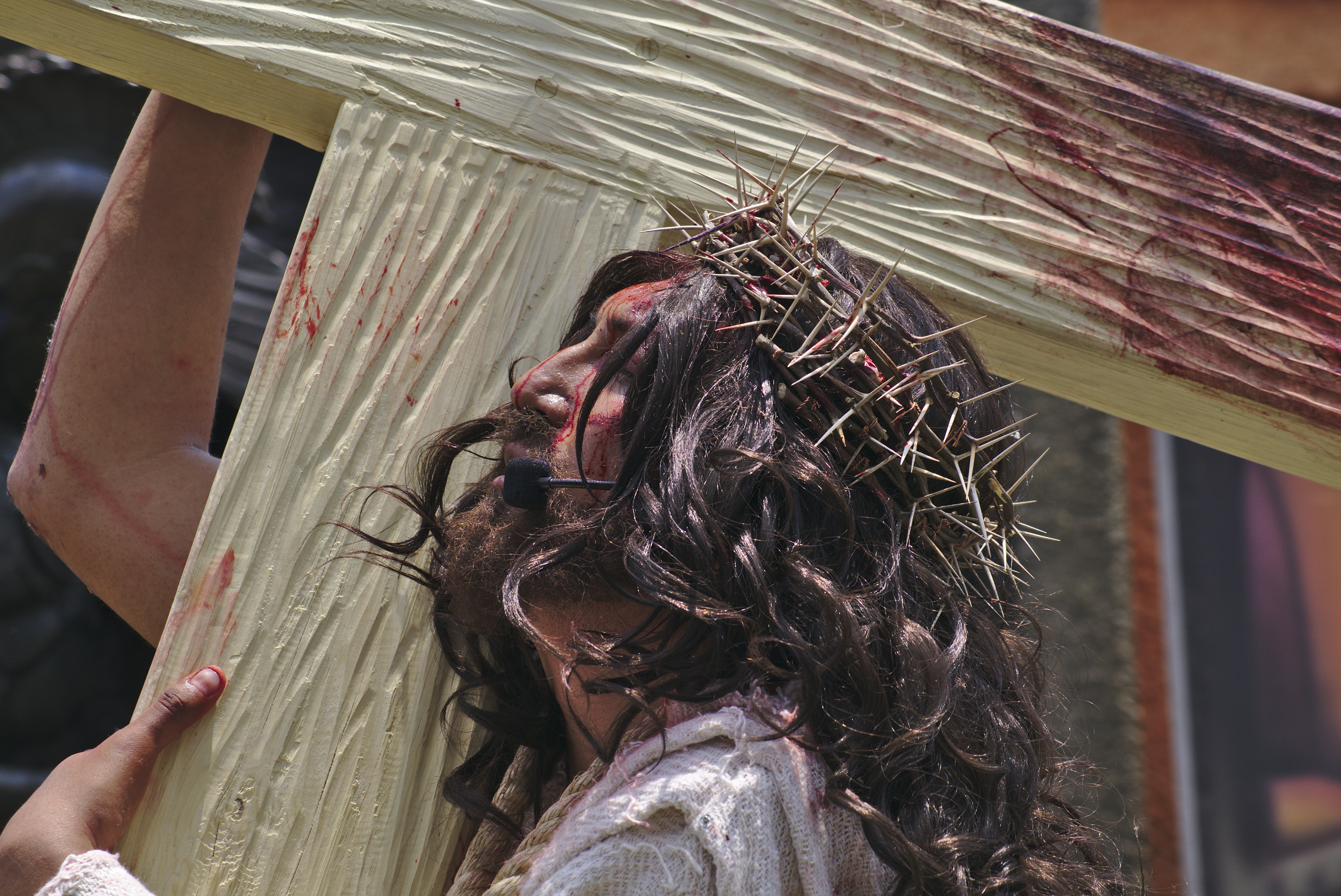 En abril de 2017 se llevo a cabo como cada año la representación de la Pasiín de Cristo durante Semana Santa en Iztapala, Ciudad de México